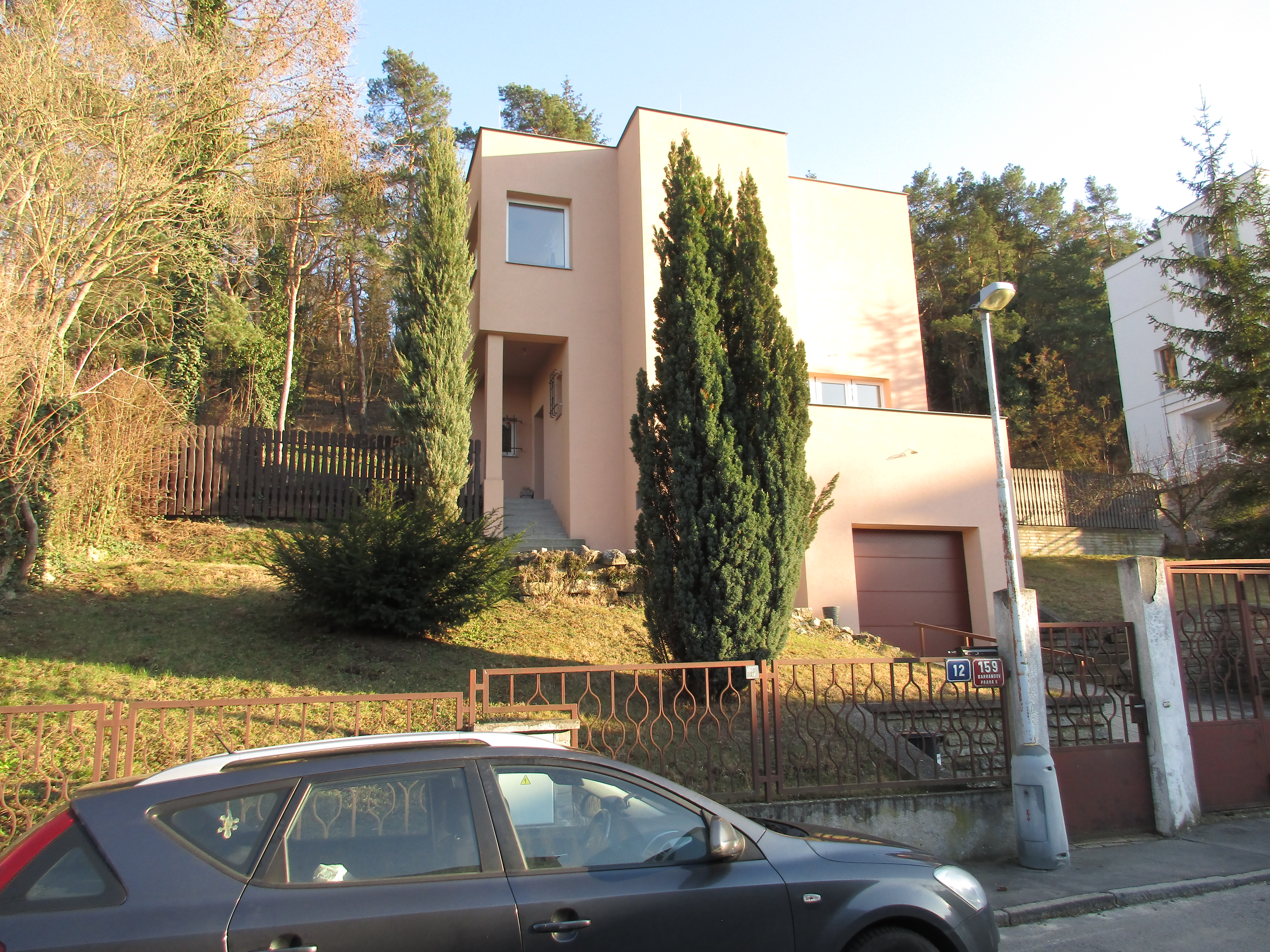 Pod Habrovou 159/12, Praha 5-Hlubočepy